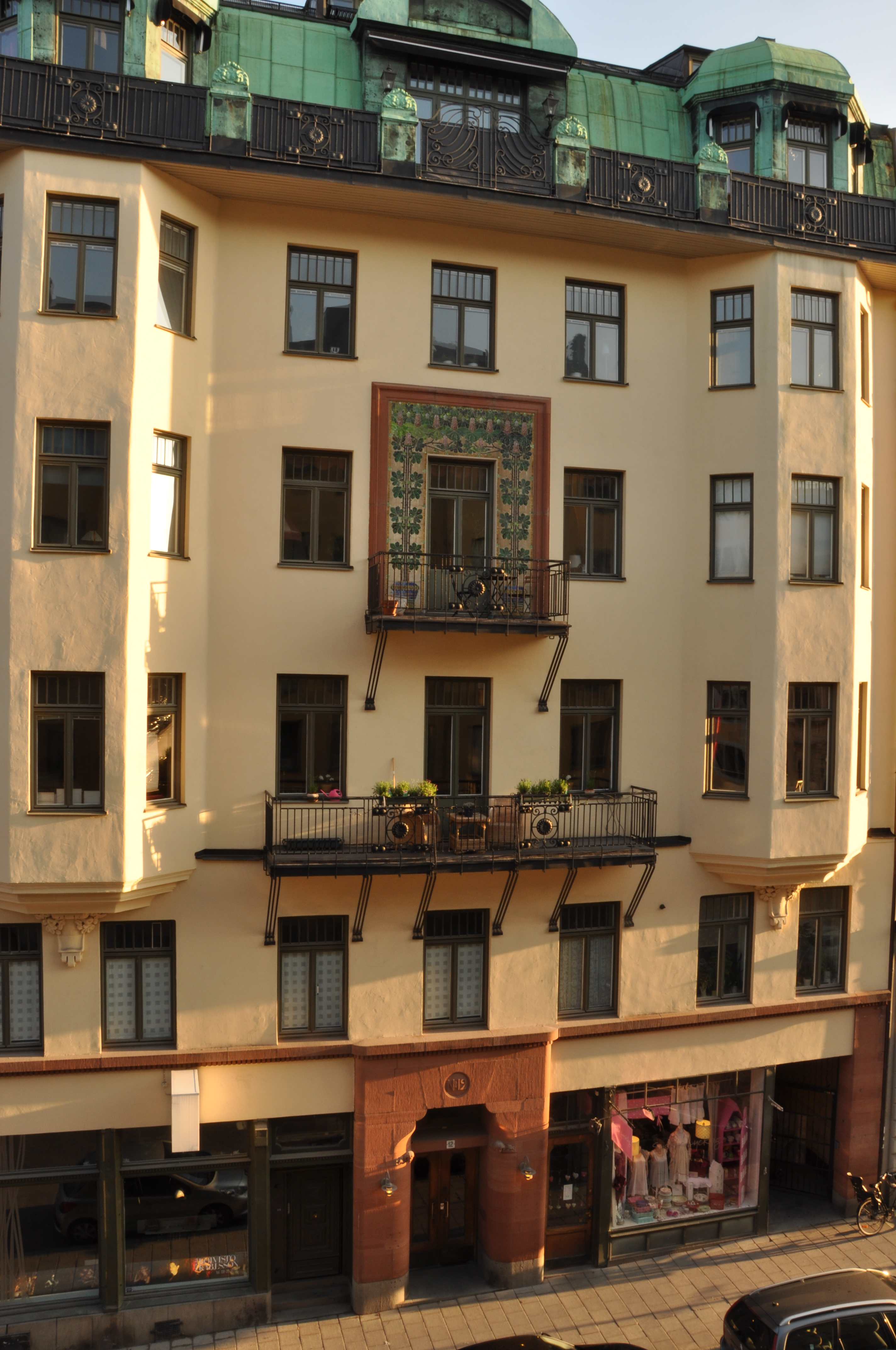 Tegnérgatan 12, Stockholm